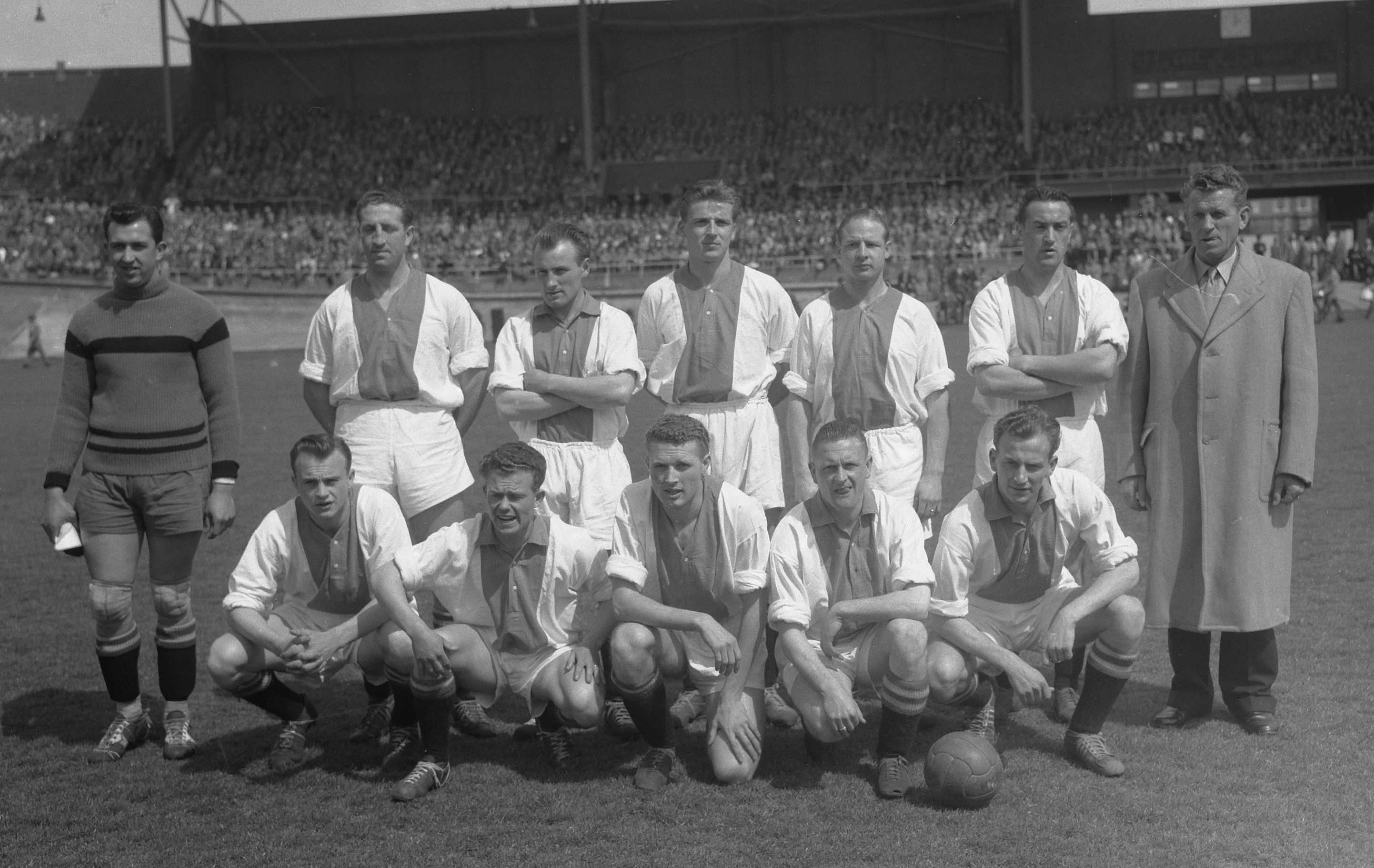 Ajax tegen BVC Amsterdam. Ajax elftal. Staand v.l.n.r. Eddy Pieters Graafland, Ger van Mourik, Ad Visser, Wim Anderiessen, Cor Geelhuizen, Klaas Bakker en trainer Karl Humenberger Zittend v.l.n.r. Piet Ouderland, Piet van der Kuil, Loek den Edel, Gerard van Dijk en Willy Schmidt.